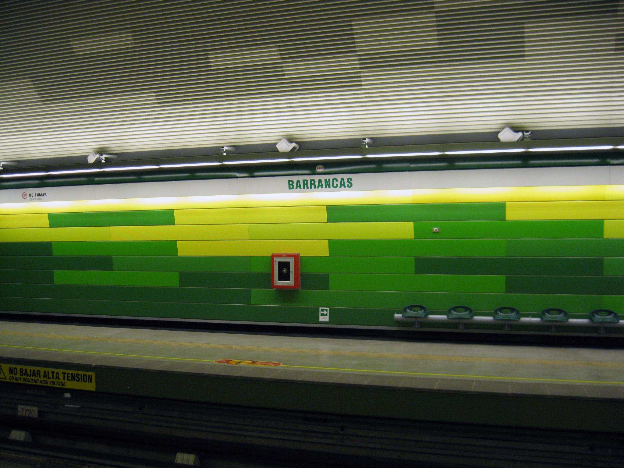 Extensión Poniente Línea 5: Febrero 2011